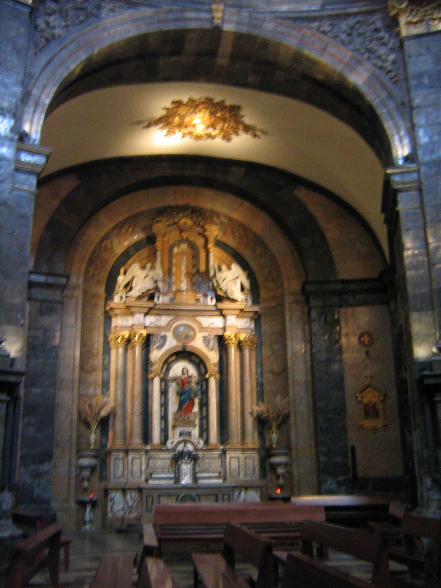 Vista del altar desde la entrada a la basílica. Santuario de Loiola, Azpeitia. Guipúzcoa, País Vasco (España).